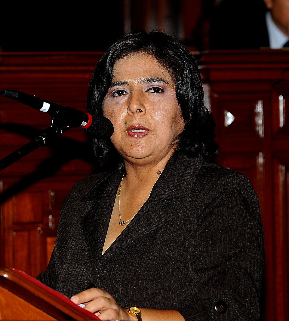 Ana Jara, ministra de Trabajo del Perú, desde el 2013.